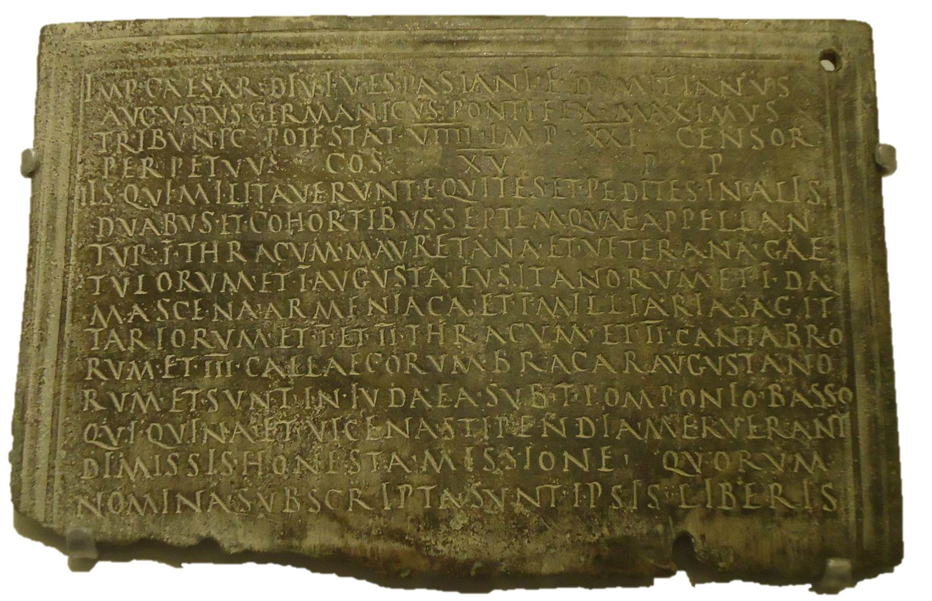 דיפלומה צבאית רומית משנת 90 לספירה מהפרובינקיה יהודה בזמן שלטונו של הנציב טיטוס פומפוניוס באסוס. הדיפלומה שייכת לחייל ביחידות העזר שהתגייס 25 שנה לפני כן, בשנת 65 לספירה. הדיפלומה הזו ועוד 6 דיפלומות נוספות מהשנים 86 - 87, מהוות את מקור המידע ליחידות העזר בפרובינקית יהודה במאה הראשונה לספירה. הדיפלומה עצמה נמצאת במוזיאון ישראל